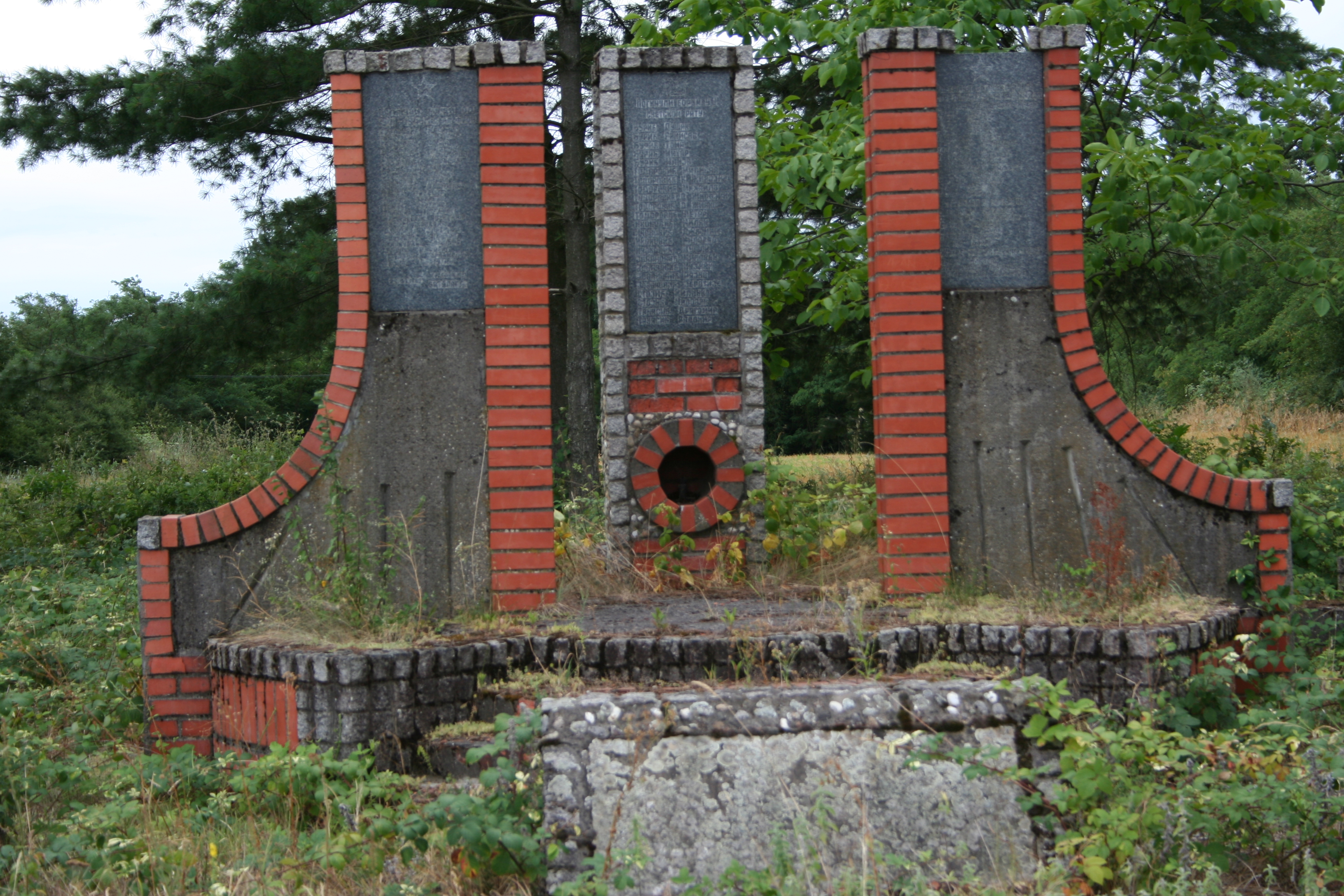 Spomenik NOB-a, Batalage